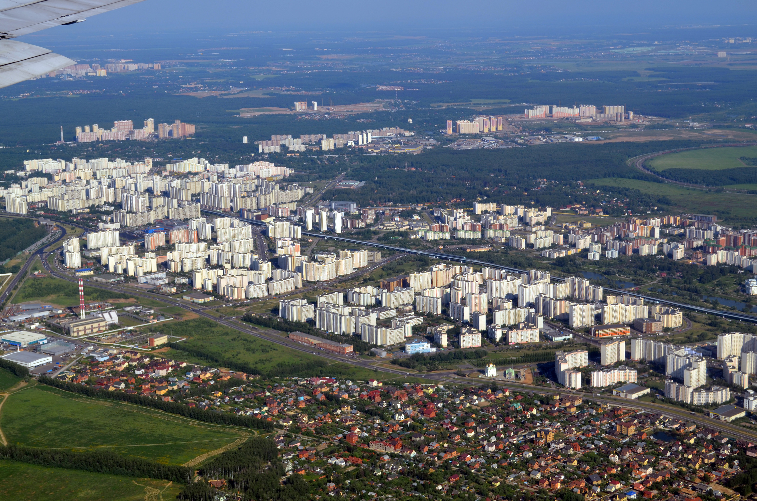 Южное Бутово